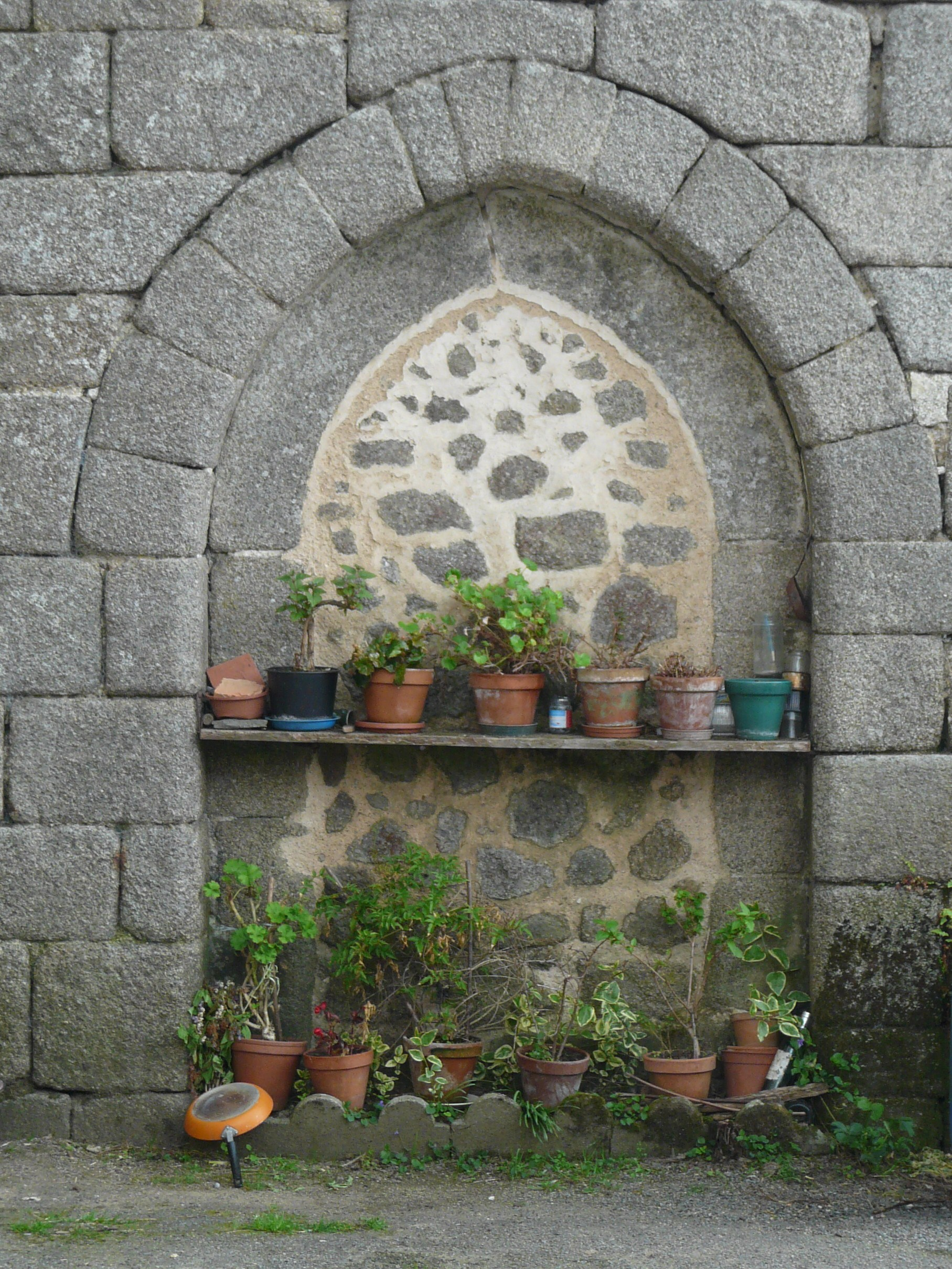 Ouverture gothique murée, mur nord de la chapelle de l'ancien prieuré de Badeix, Saint-Estèphe, Dordogne, France.